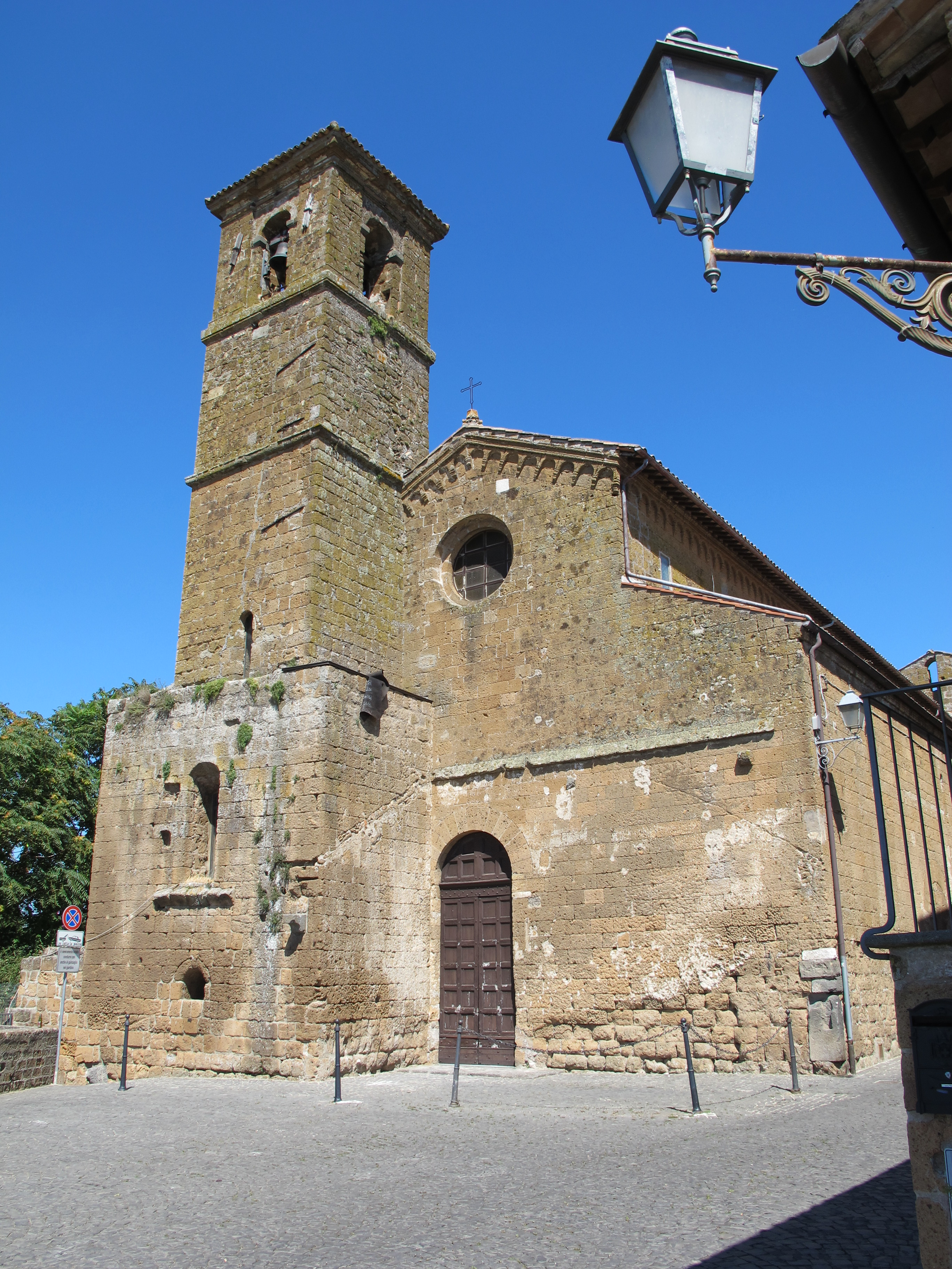 Orvieto